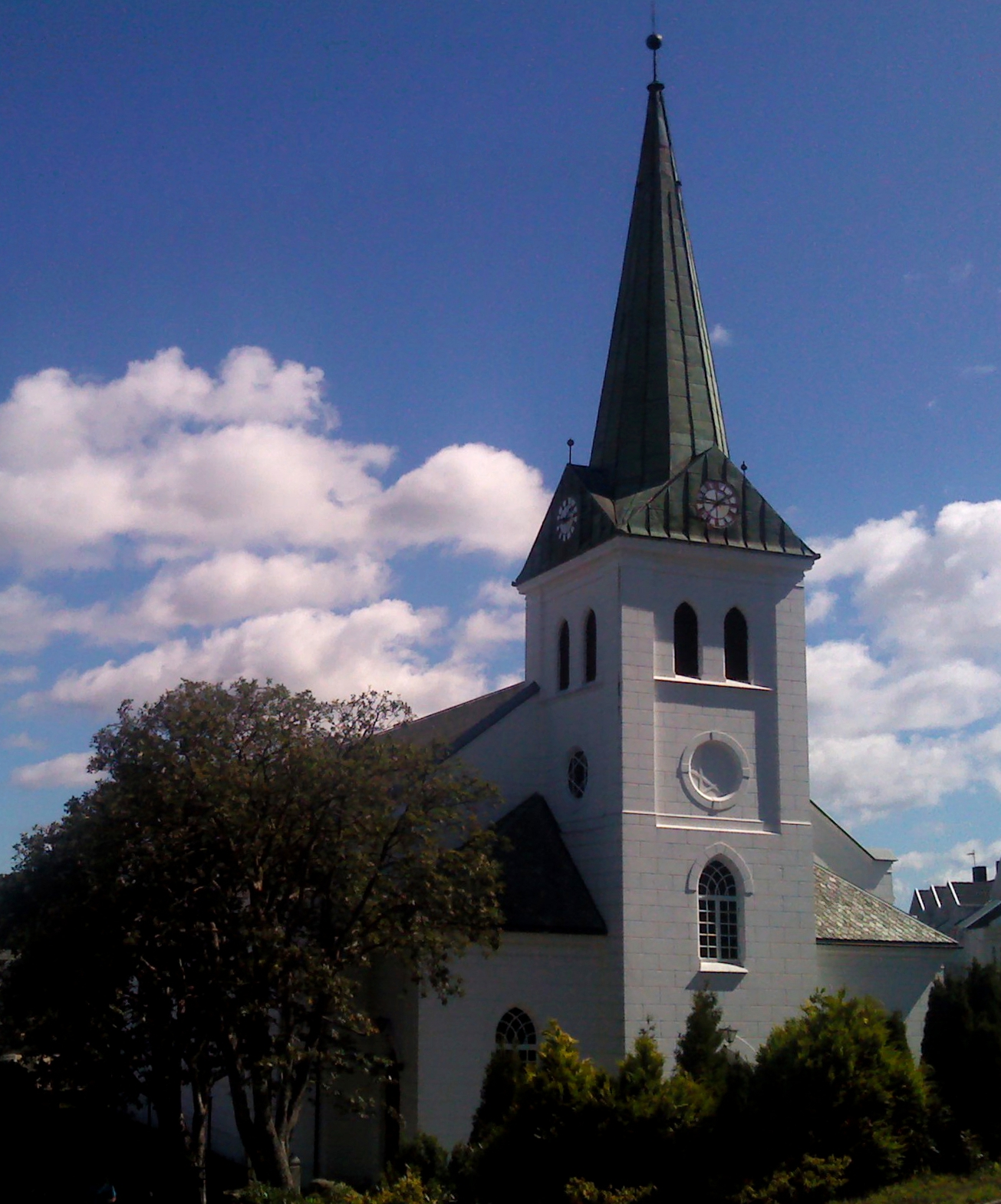 Frelserens kirke i Farsund